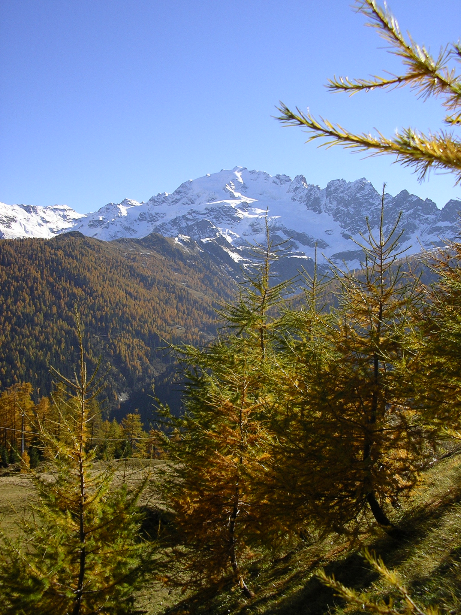 Cima Piazzi in autunno